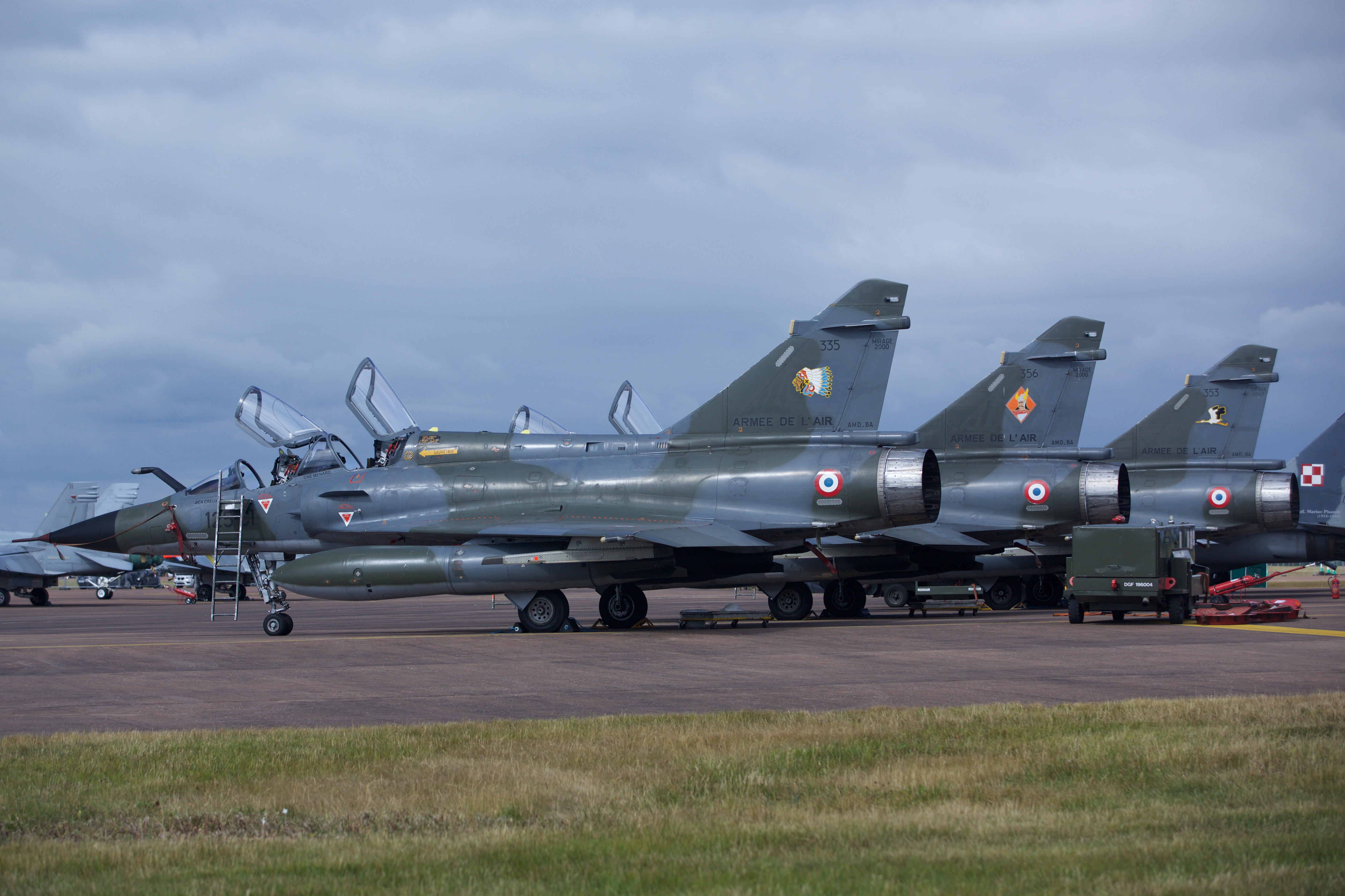 Dassault Mirage 2000N